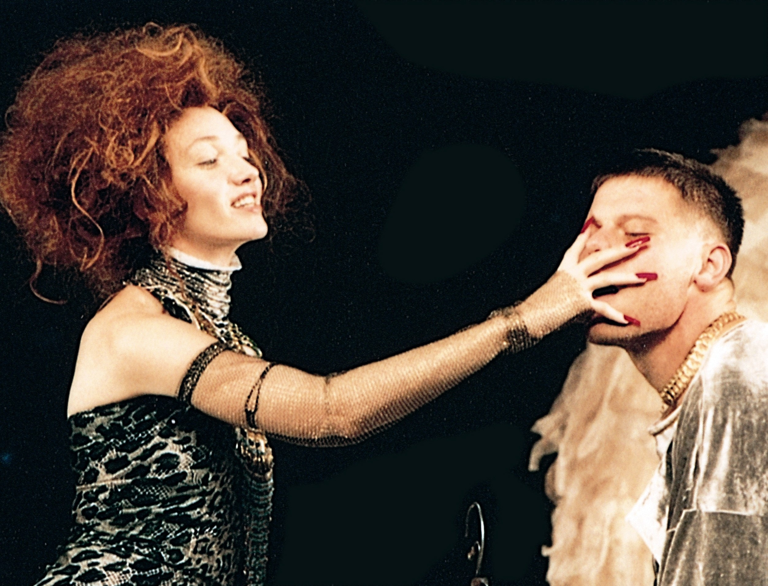 אמנון וולף ויבגניה דודינה בהצגה אוכלים